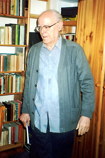 Fernando de Diego (Fotis Irmi Haupenthal)